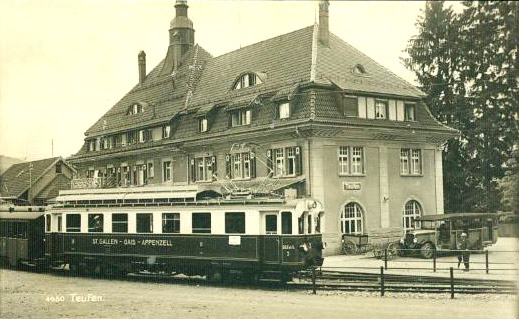 Der Triebwagen BCFeh 4/4 Nr. 3 in den allerersten Jahren in Teufen.